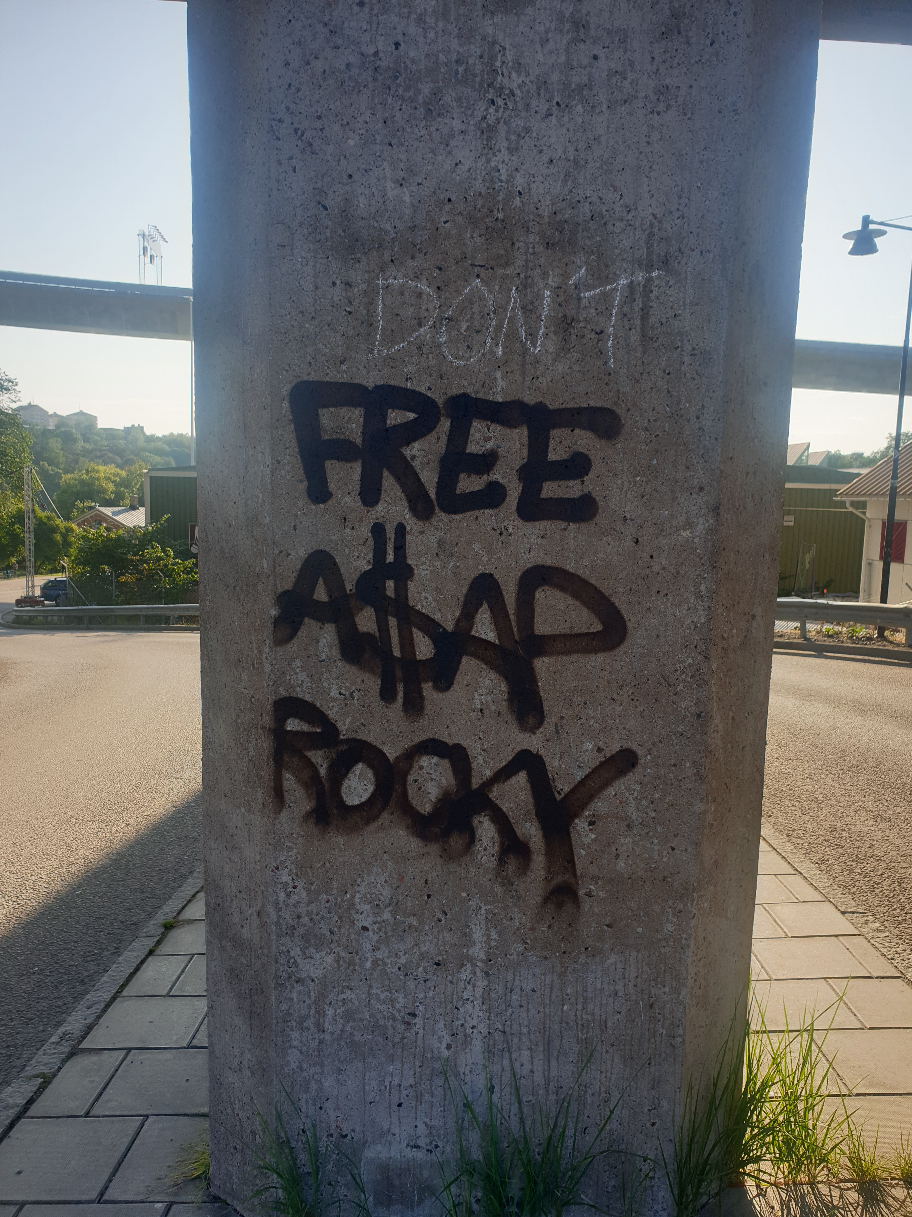 Blandade åsikter om A$AP Rocky relaterat till häktningen i Sverige sommaren 2019.